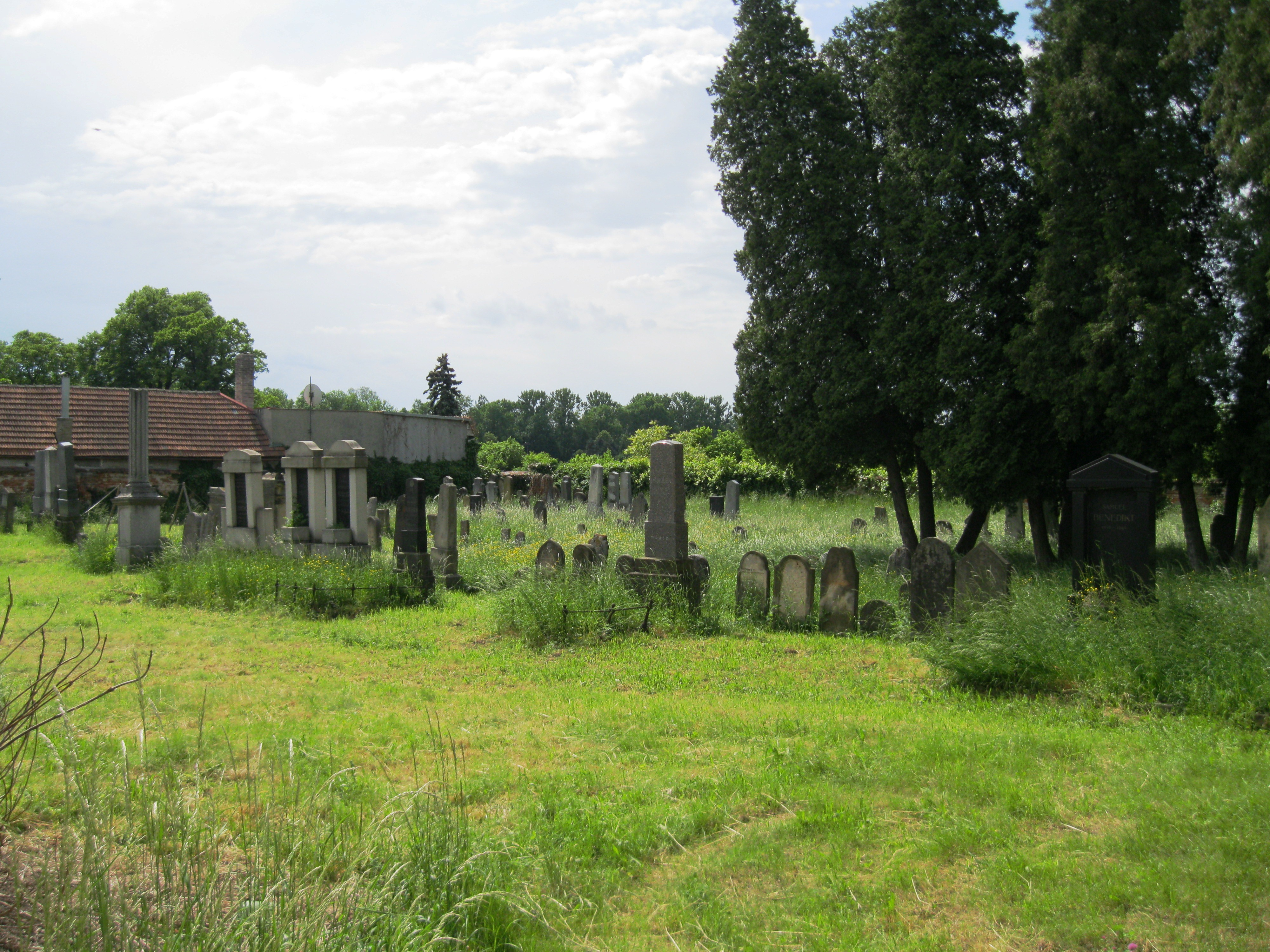 Židovský hřbitov (Tovačov), Podvalí, Tovačov